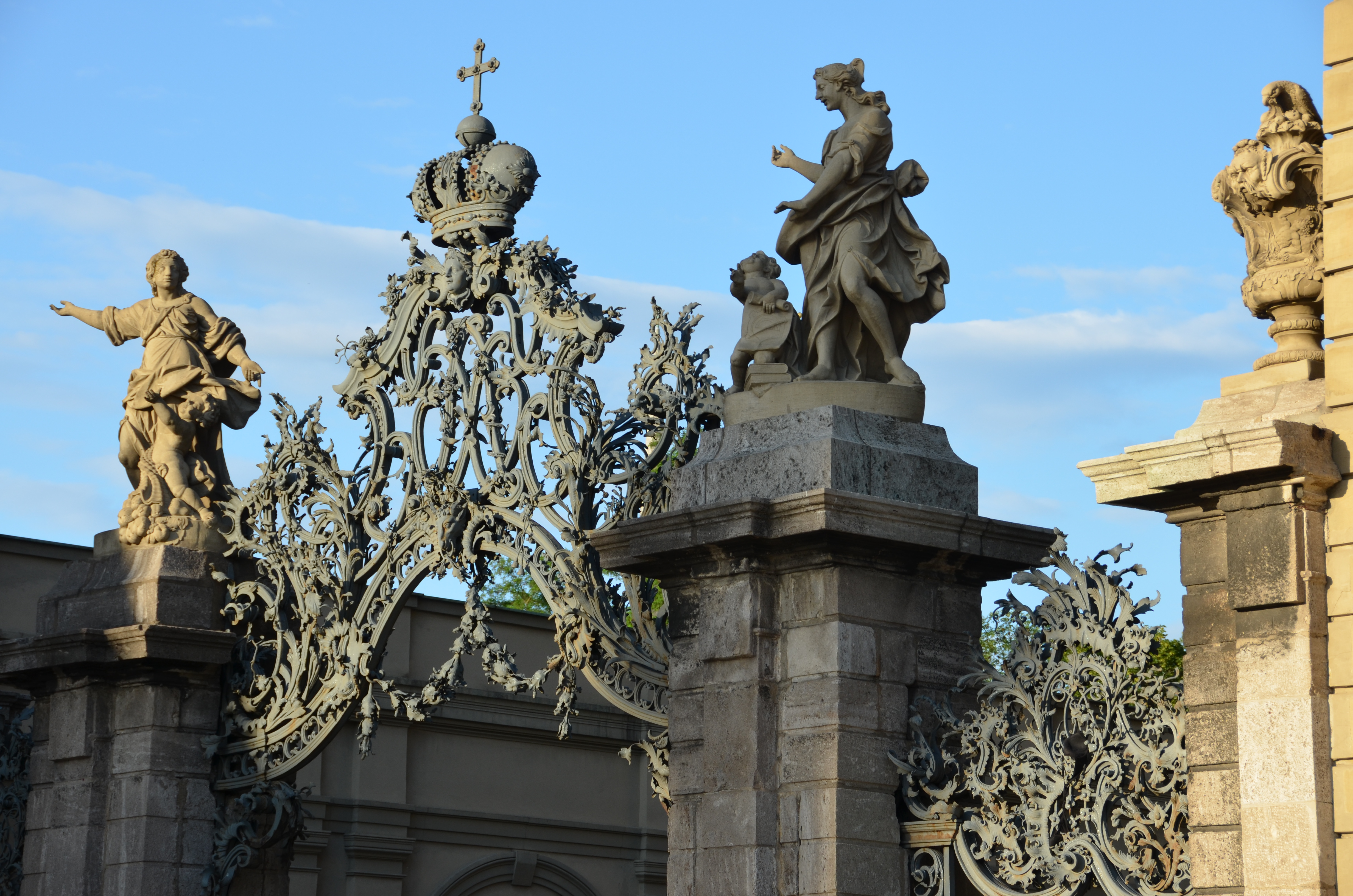 Oeggtor; verbindet Residenzplatz 2 und 3, 97070 Würzburg; 49° 47′ 34″ N, 9° 56′ 19″ O